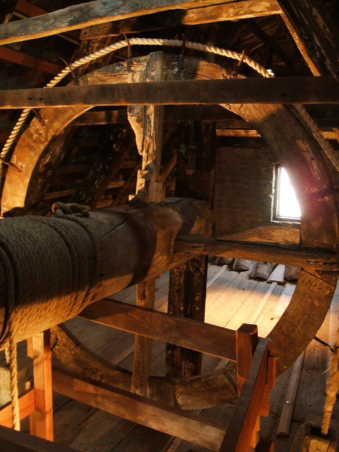 Das Foto zeigt Details des Museumshauses in der Mönchstraße in Stralsund im März 2007.